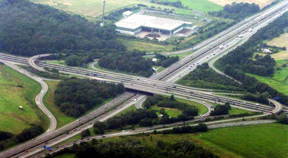 Das Autobahnkreuz Breitscheid in Ratingen, Blick von Osten in westlicher Richtung. Es verbindet A 3 (unten), A 52 (oben) und A 524 (nicht sichtbar ausserhalb des Bildes oben links)